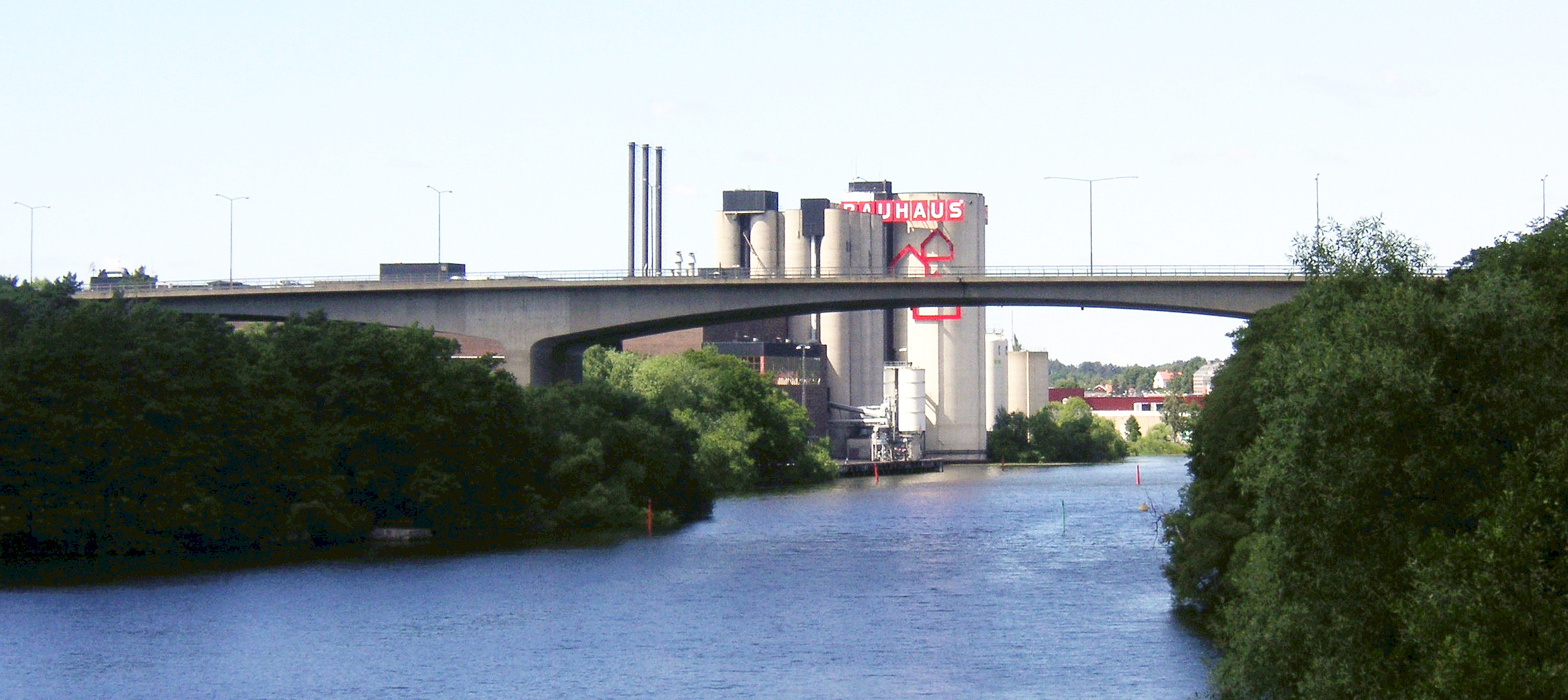 Huvudstabron i Solna